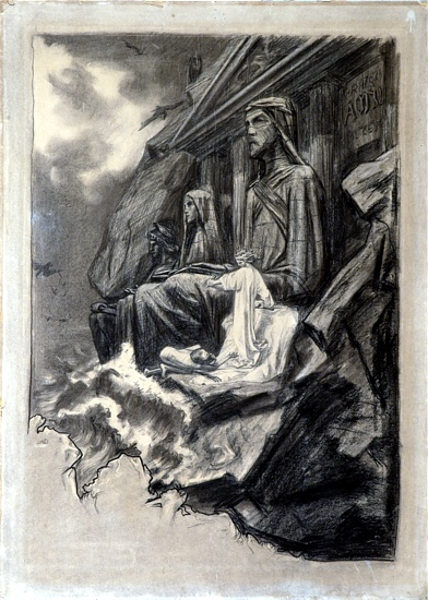 Jak mi připadá práce spisovatelova, ilustraceZeyerovu Románu o věrném přátelství Amise a Amila